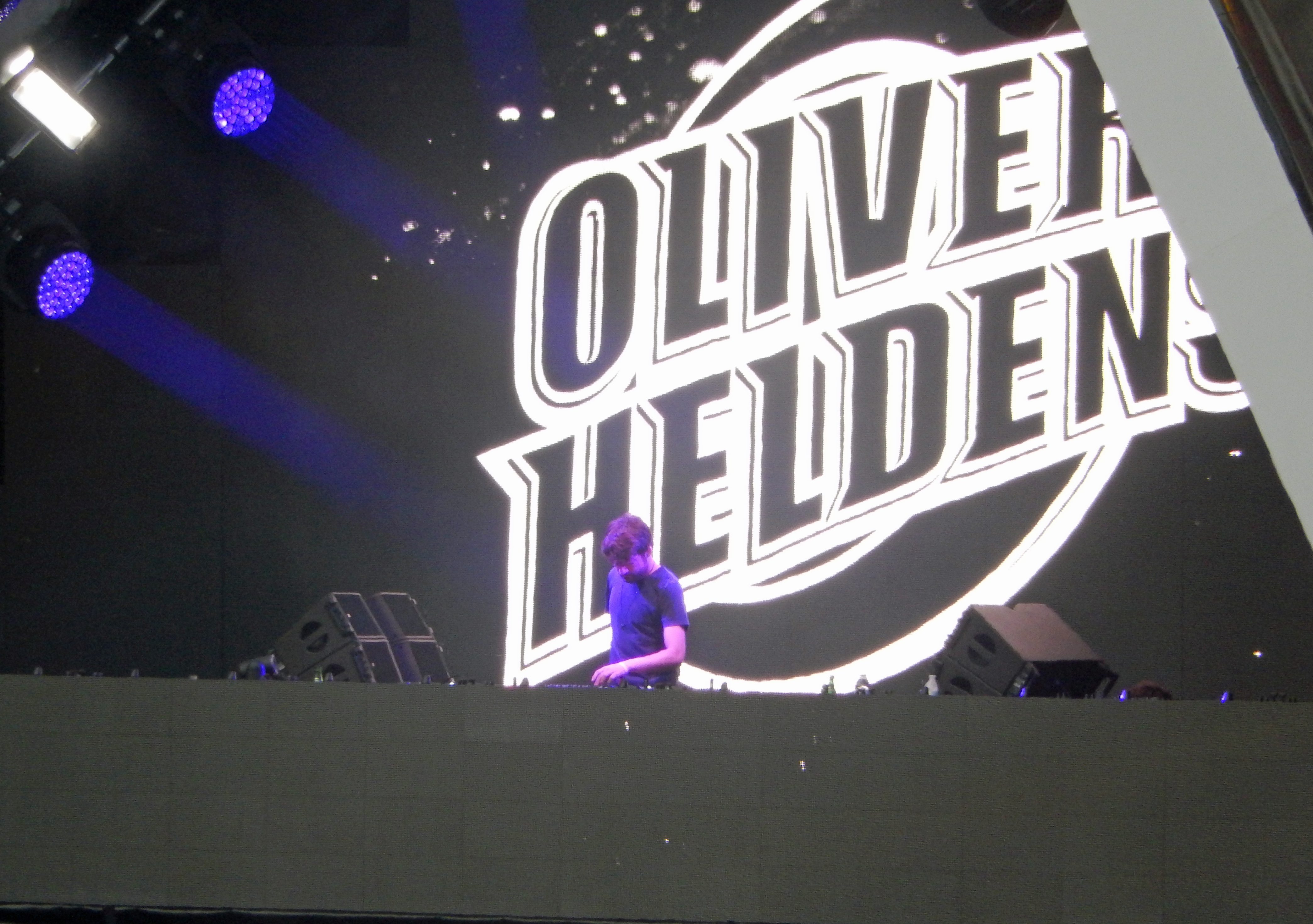 Oliver Heldens